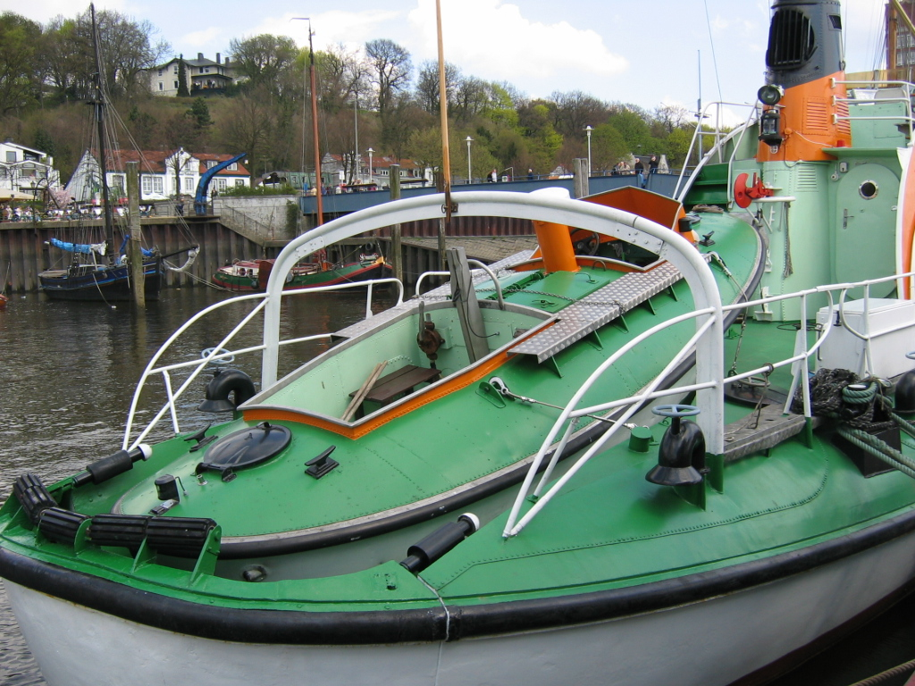 Łódź ratownicza Michel na pokładzie statku ratowniczego - skansen oldtimerów Hamburg Overglöne